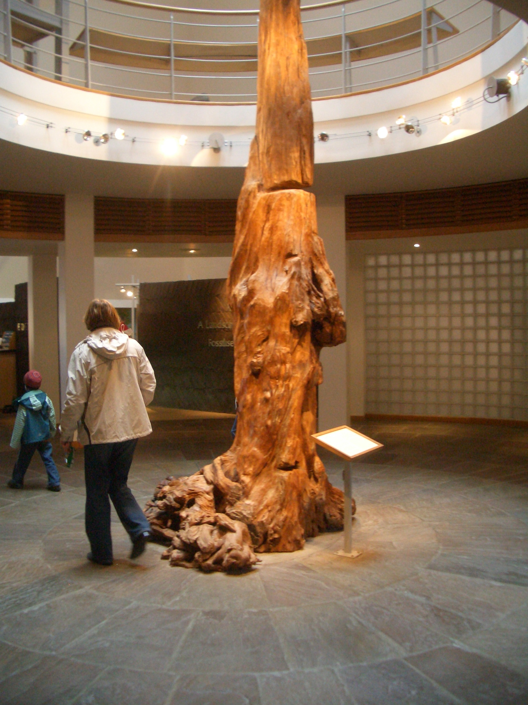 Museum Ceide Fields